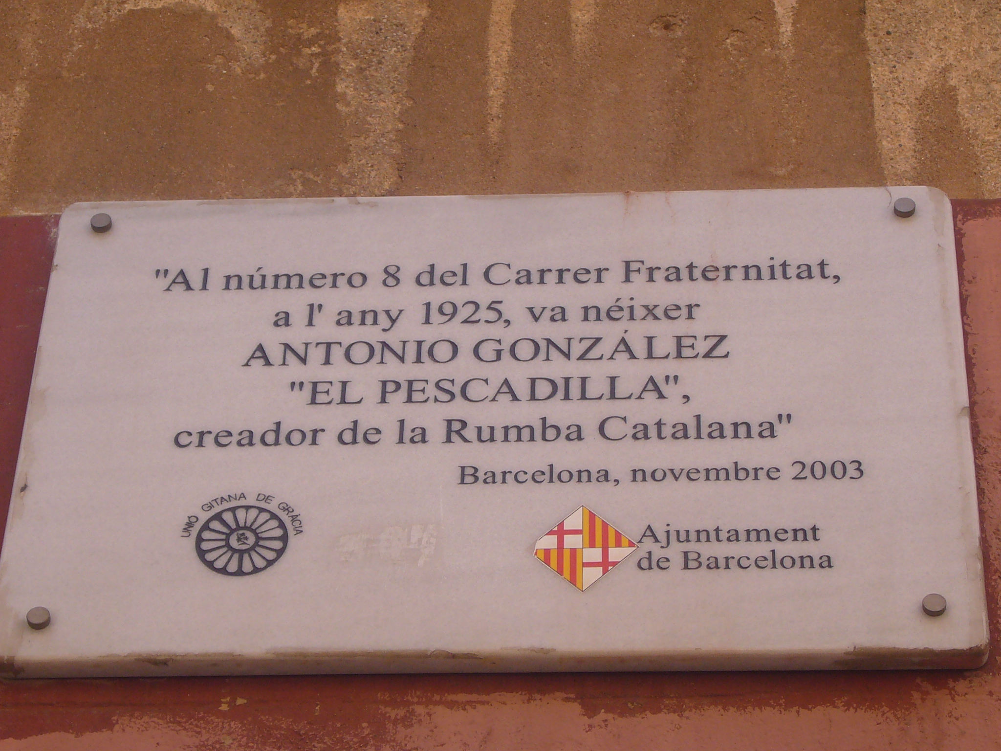 Placa a la casa natal El Pescadilla (carrer Fraternitat num 8)